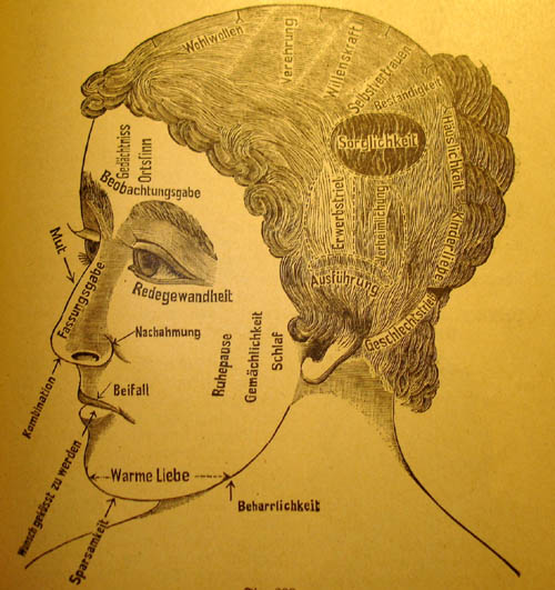 Bilz - Das neue Naturheilverfahren (75. Jubiläumsausgabe) von 1894. Leider noch keine ISBN-Nummer damals, dafür mit abgelaufenem Copyright und toll vergilbt. Riecht auch schon ein wenig modrig.